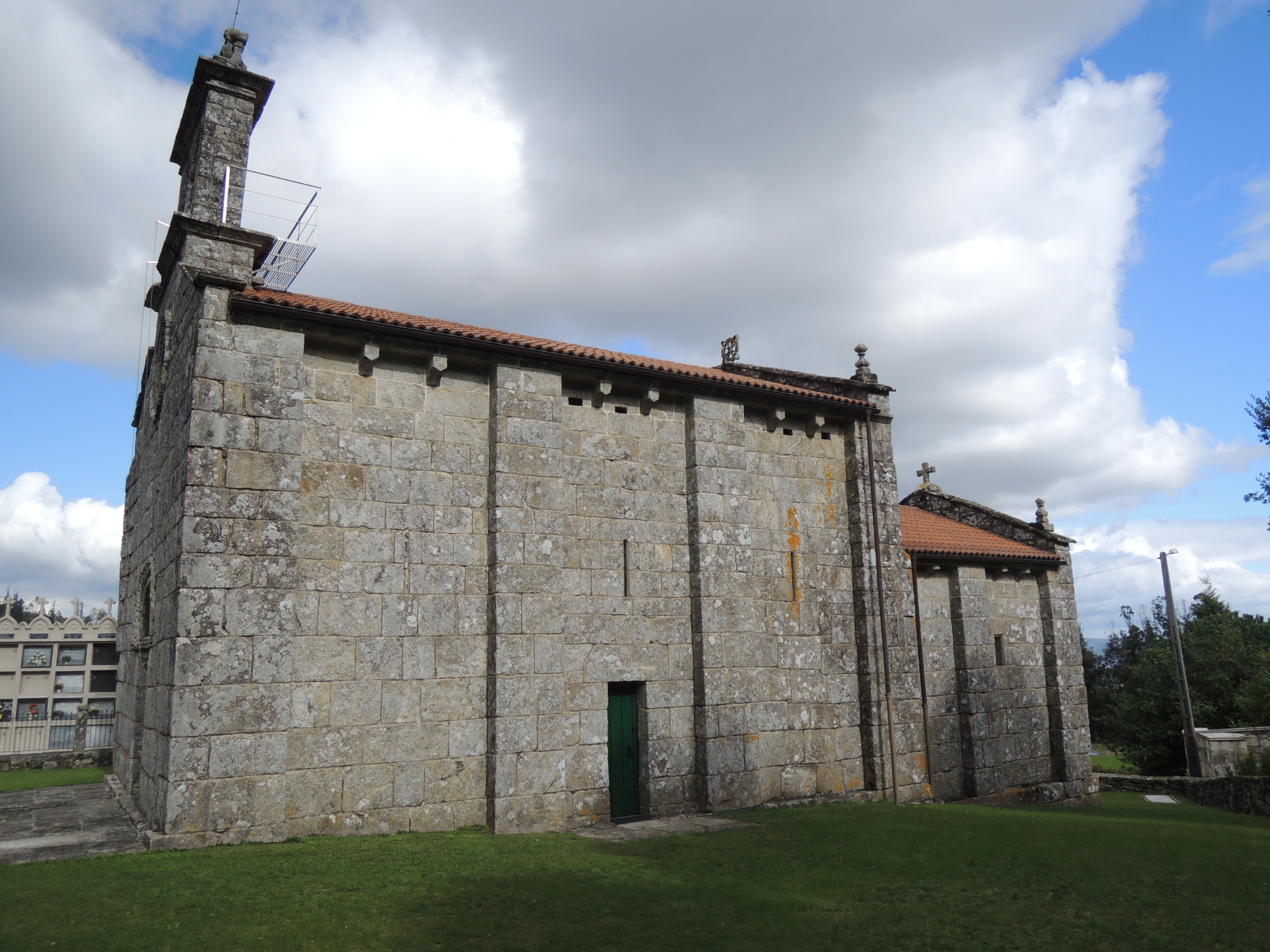 Construida a mediados del siglo XII, es de planta de nave única y ábside rectangular.